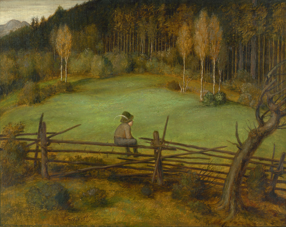 „Der Zaunkönig“ (Kleiner Bergbauernbub auf dem Gatter sitzend und in die Landschaft blickend). Öl auf Holz. 39 x 49 cm. Am unteren Rand signiert "M. Schiestl".